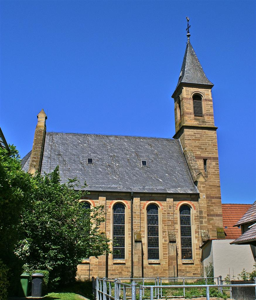 Kleinvillars ev. Kirche